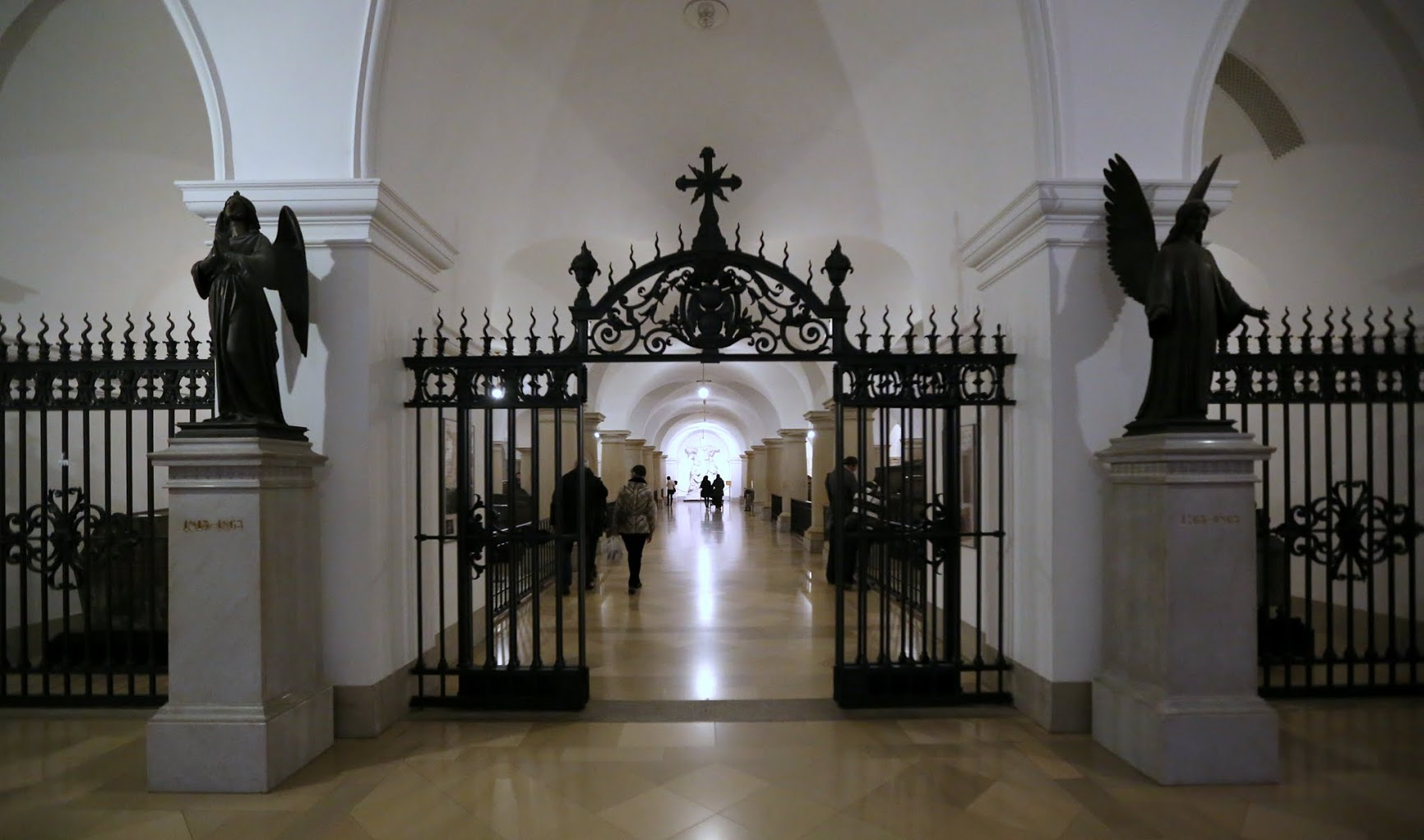 Berlini dóm altemploma